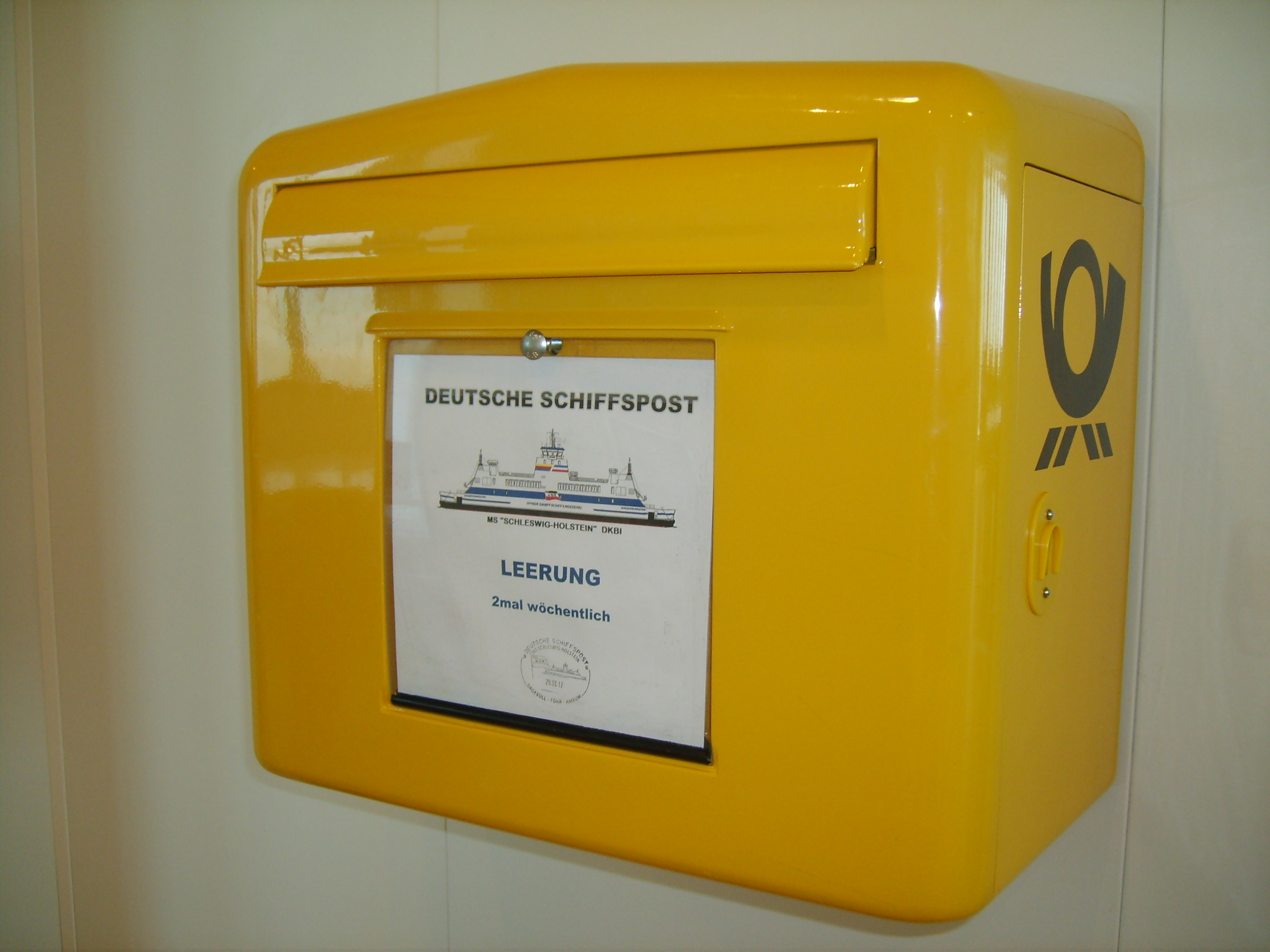 Schiffsbriefkasten an Bord der Fähre Schleswig-Holstein der Wyker Dampfschiffs-Reederei Föhr-Amrum